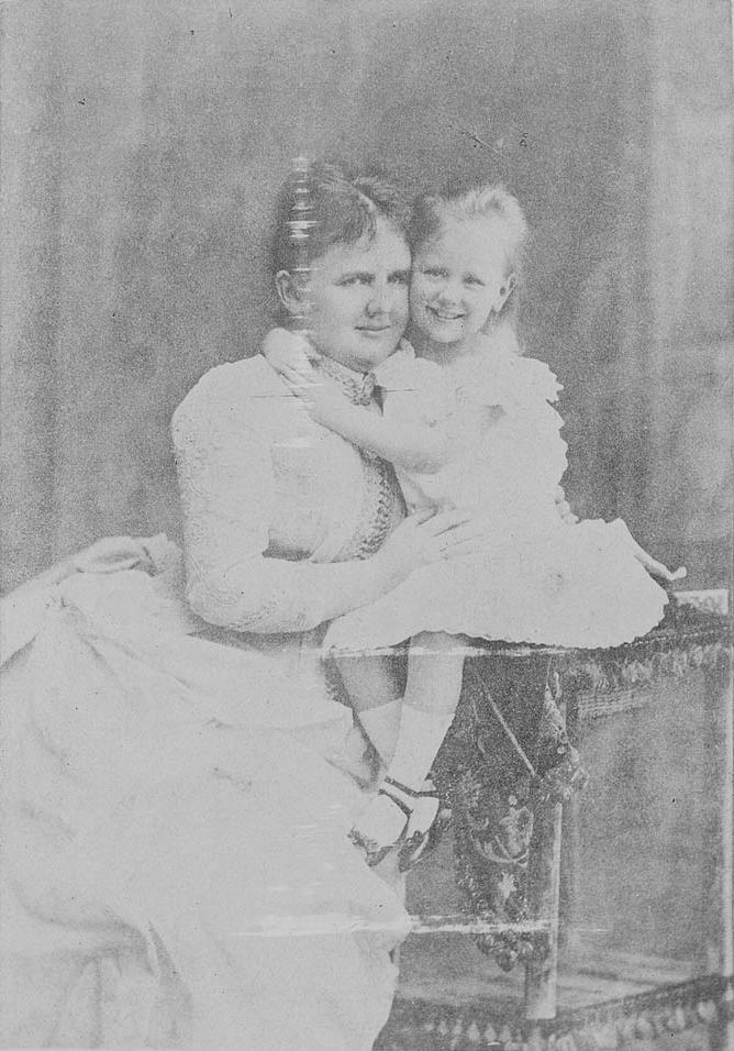 portret van koningin Emma en prinses Wilhelmina. Foto. Amsterdam, Rijksmuseum Amsterdam, collectie foto's (inv.nr. RP-F-F00650-I). Provenance: 1993: ownership transferred to Rijksmuseum Amsterdam, Amsterdam